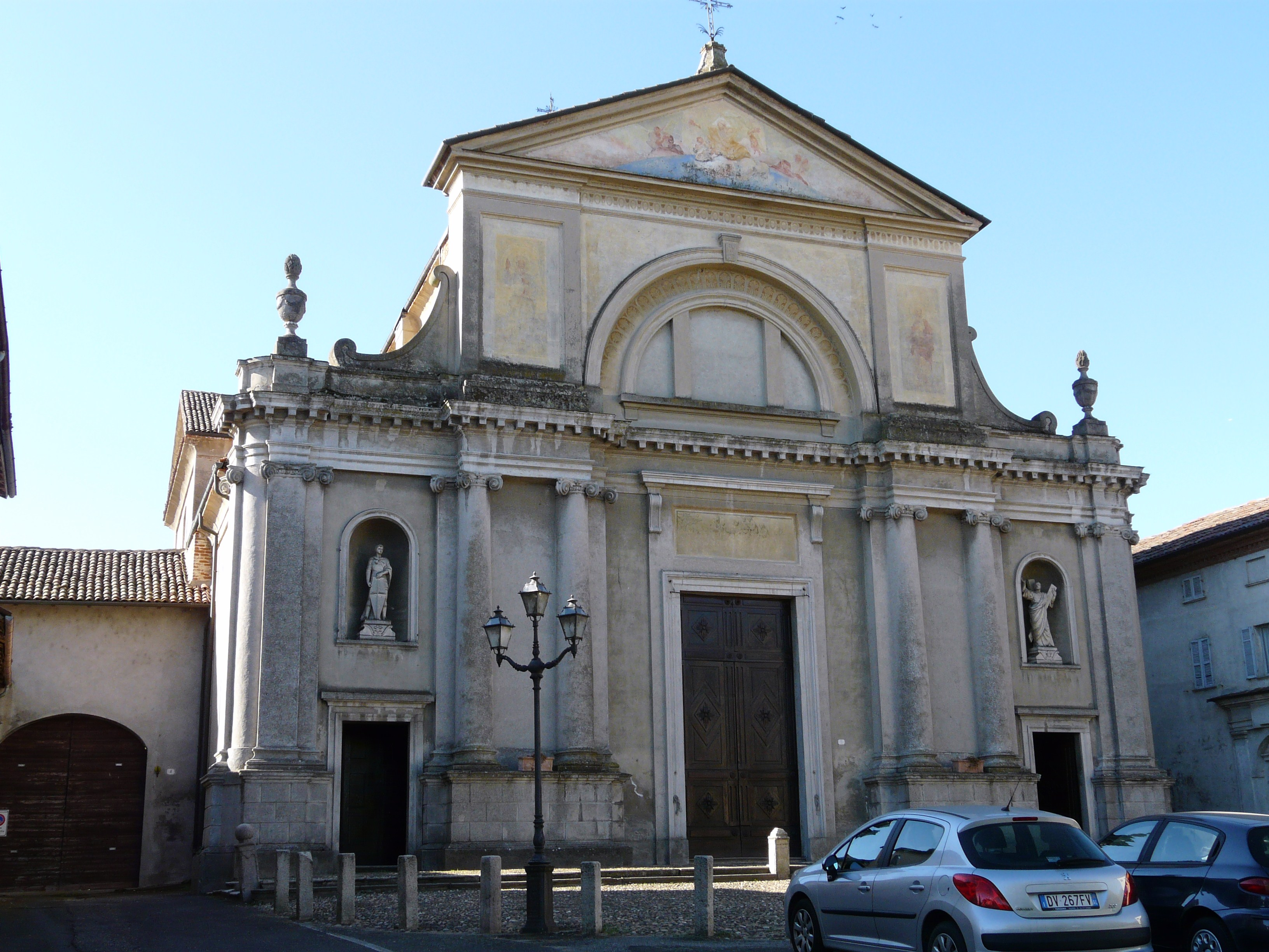 Chiesa di Santo Stefano, Bassignana, Piemonte, Italy